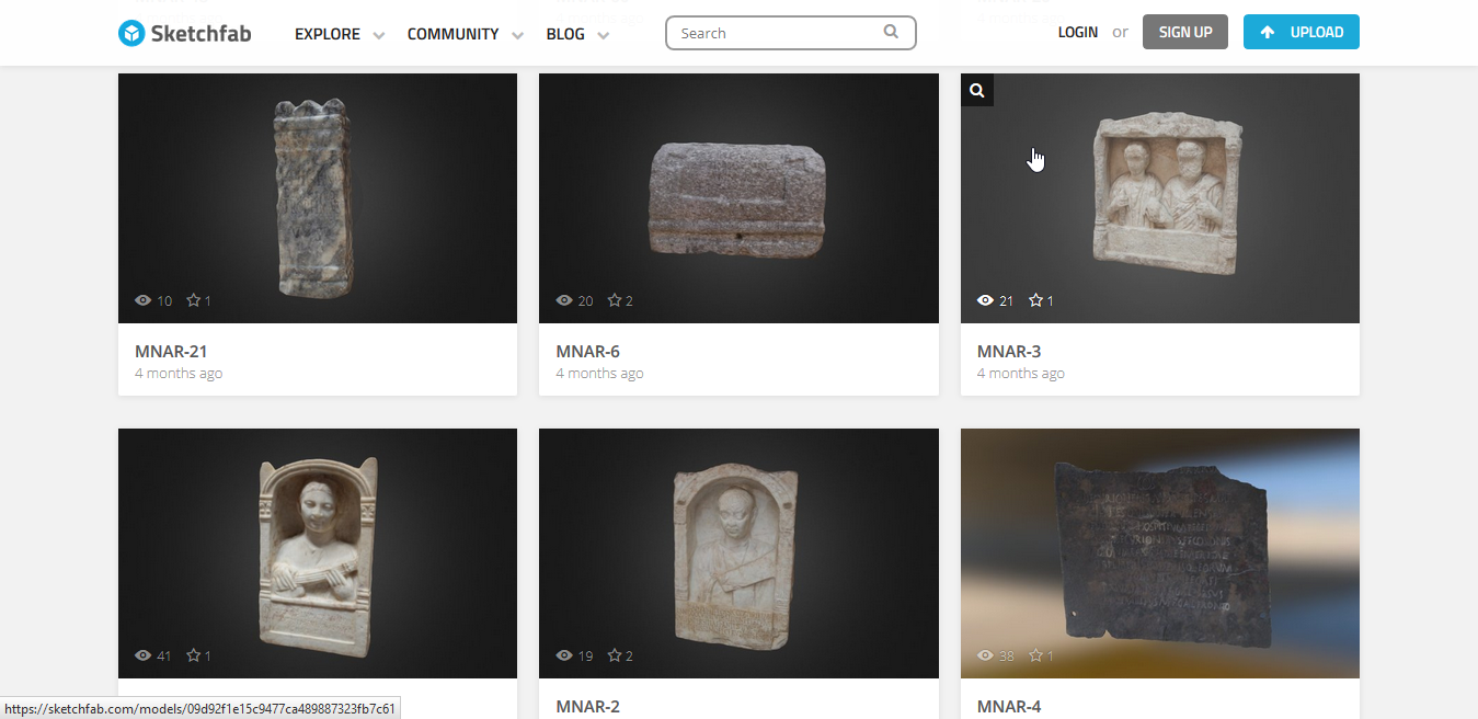 Captura de pantalla del pérfil de Sketcfab del proyecto Epigraphia 3D